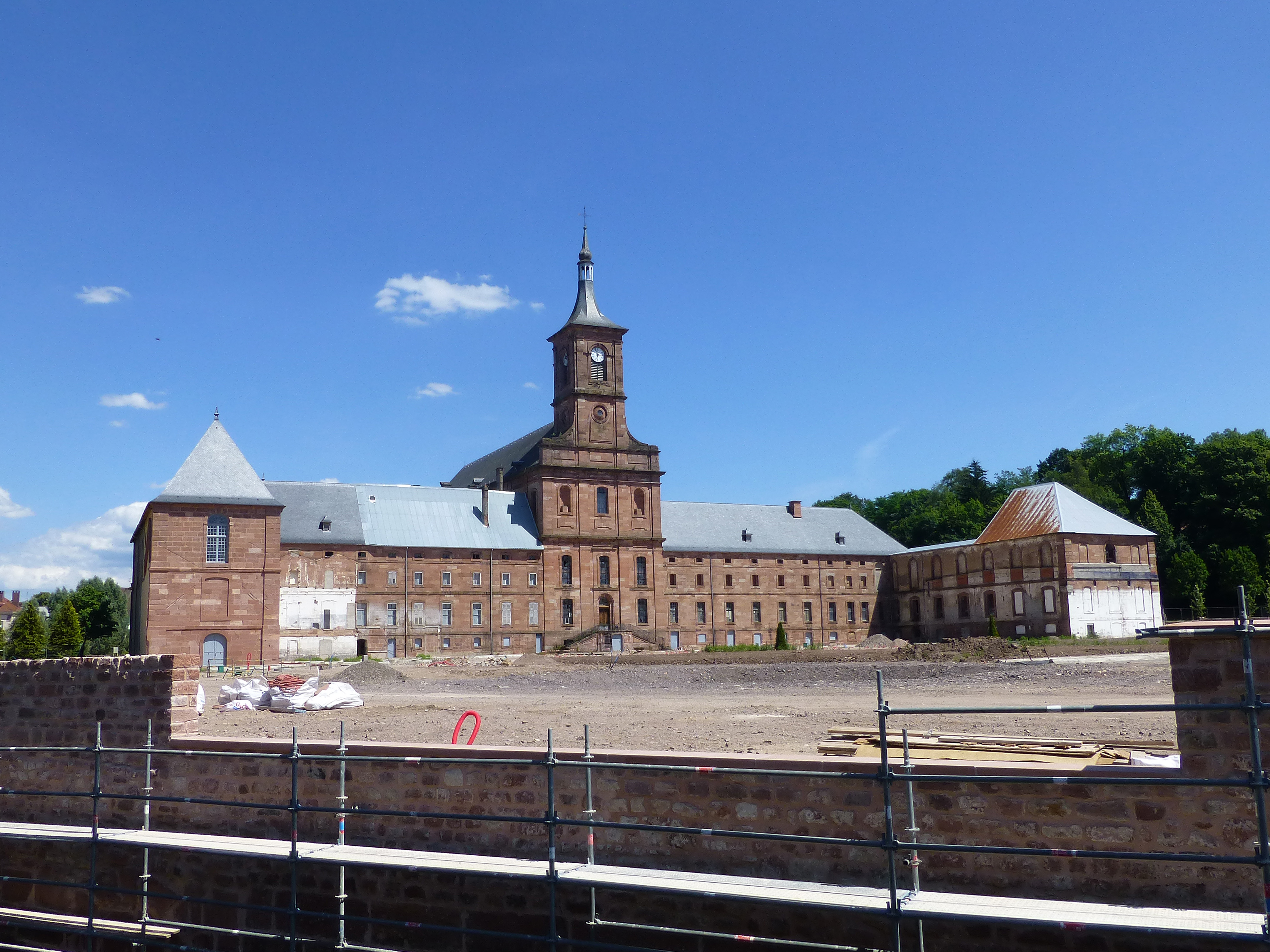 Abbaye de Moyenmoutier (Vosges) : aménagement de l'esplanade en cours en juin 2014